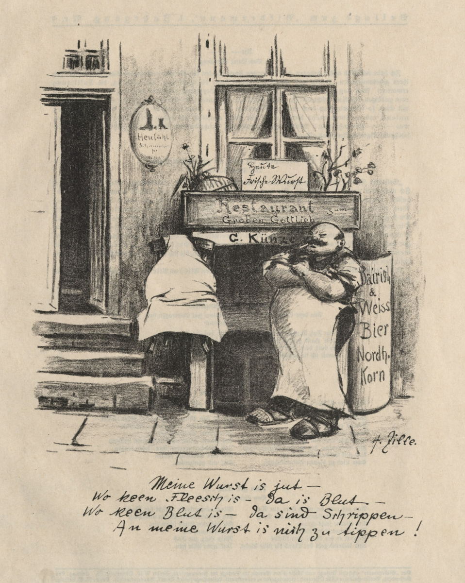 Heinrich Zille Blatt mit dem Titel "Der Budiker" aus der Grafischen Sammlung der Stiftung Stadtmuseum Berlin